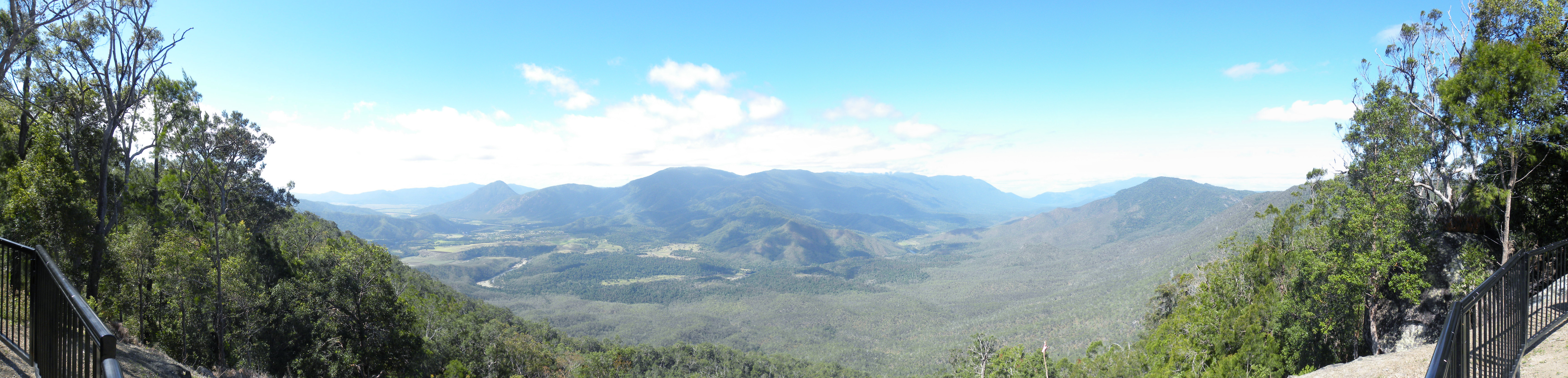 Gillies Lookout